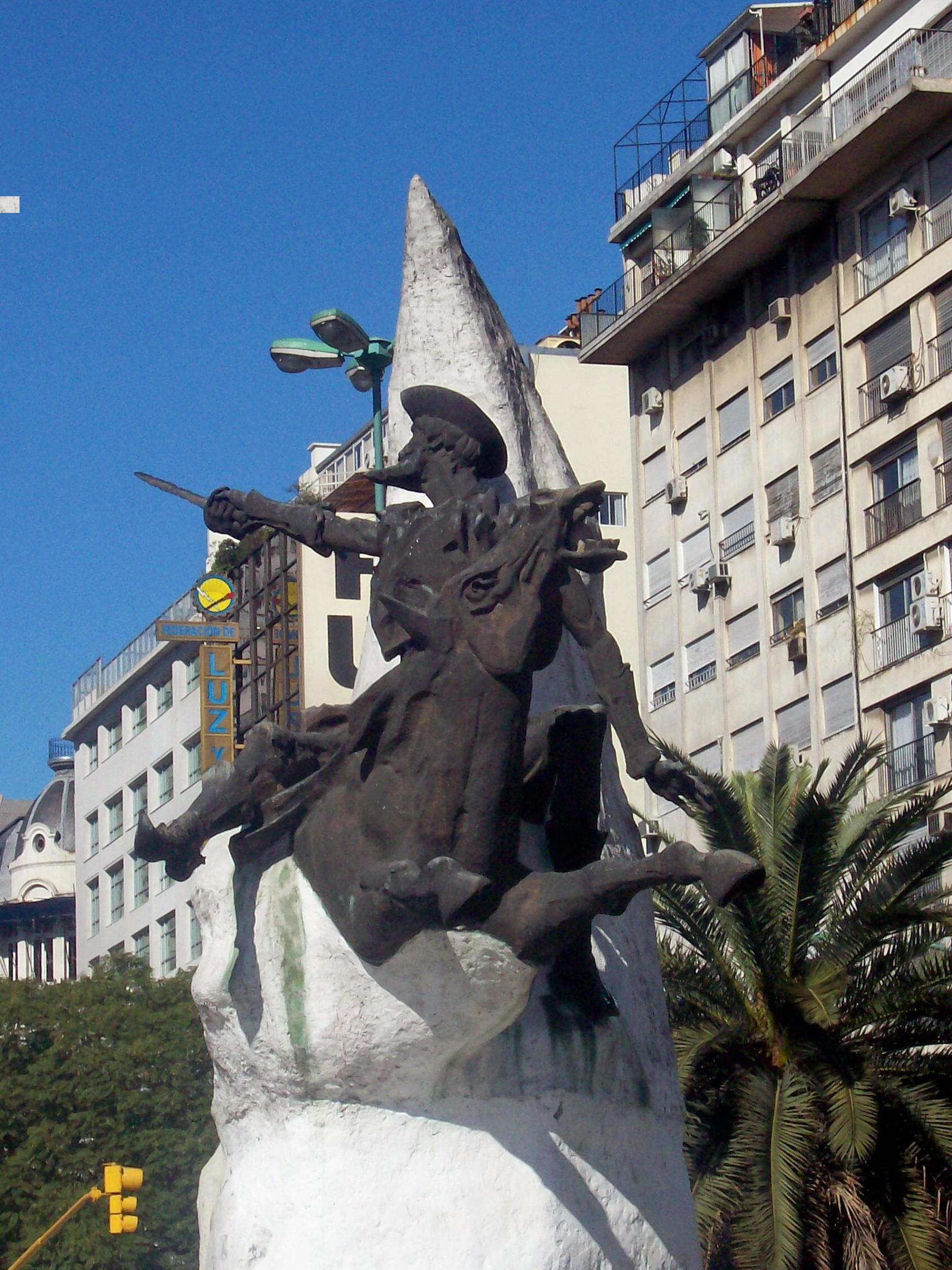 Homenaje al Quijote, en la Avenida 9 de Julio, Buenos Aires, Argentina, con un pedestal blanco que busca imitar las colinas manchegas, realizado en conmemoración de los cuatrocientos años de la segunda fundación de la ciudad. Escultor: el español Aurelio Teno.